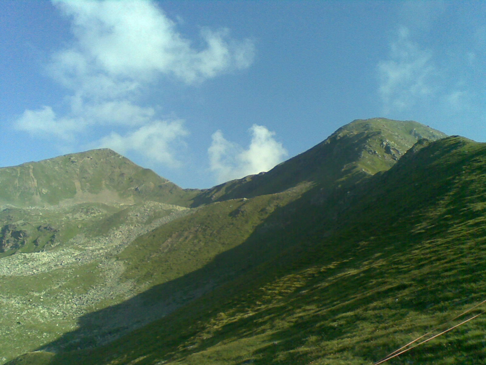 Tuatti e punta di Quaira Dal Passo Palu